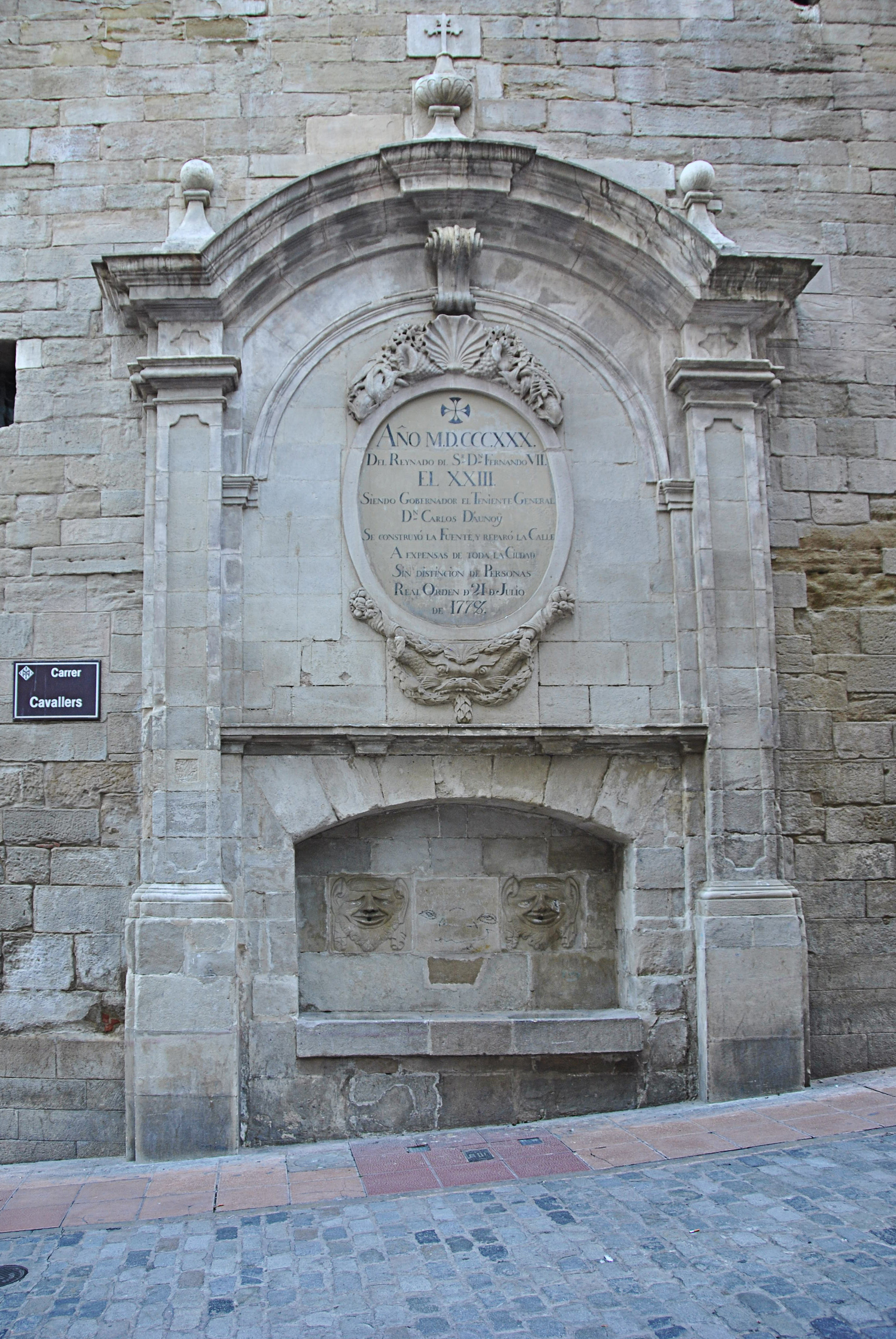 Font del Roser (Lleida)